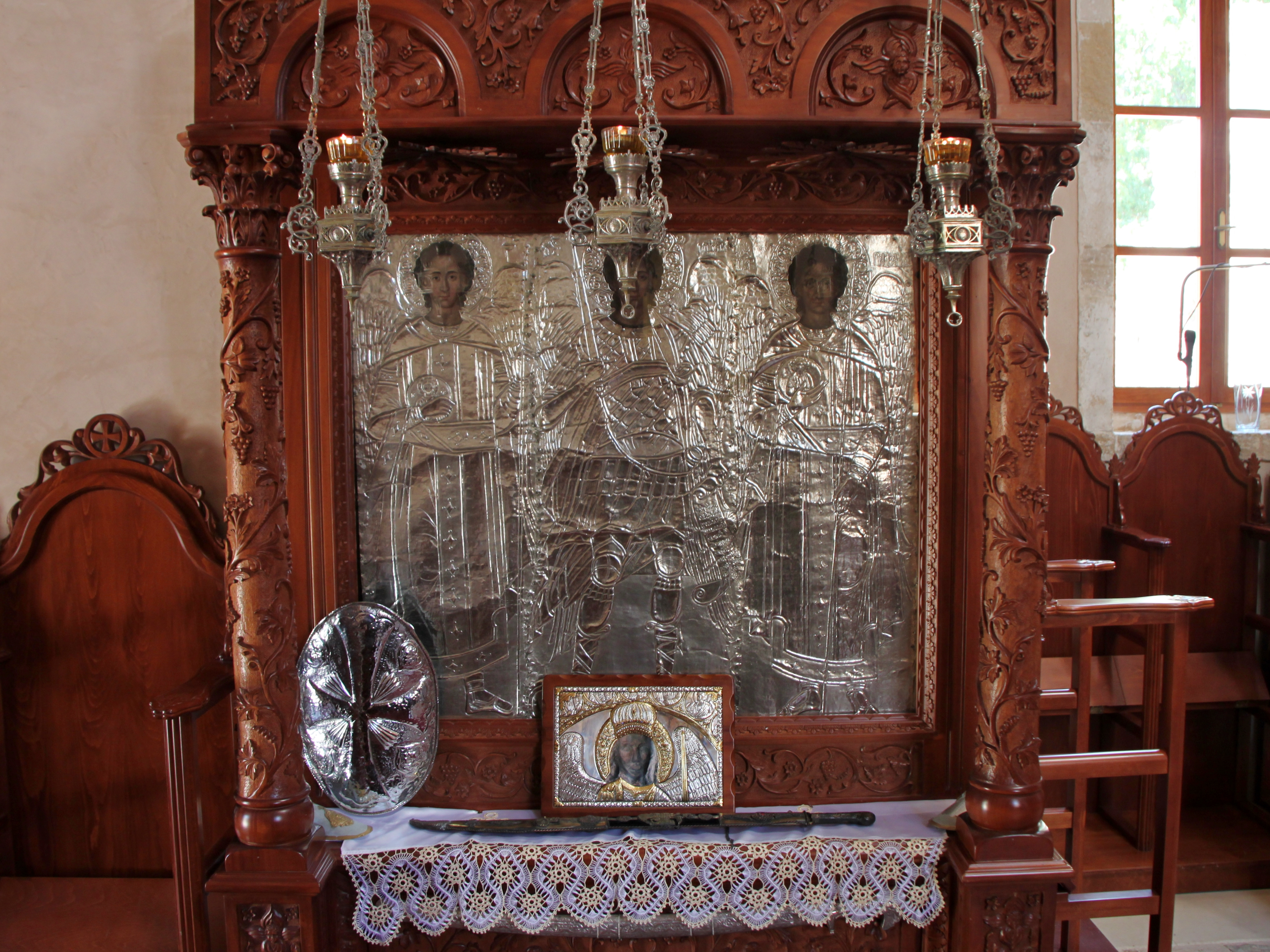 Innenraum der Kirche des Klosters Moni Asomaton im Amari-Becken, Gemeinde Syvritos, Präfektur Rethymno, Kreta, Griechenland